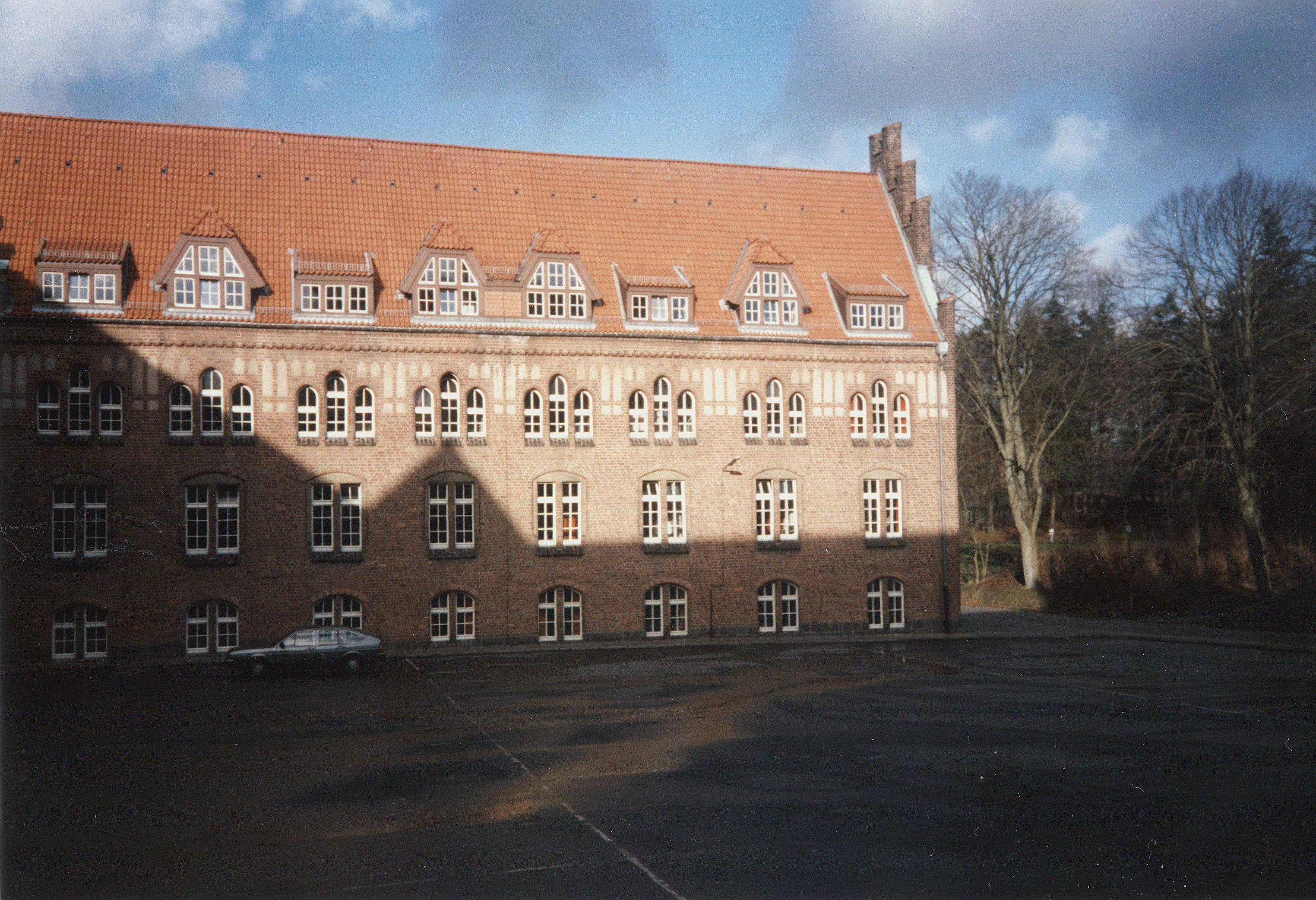 Seitenflügel der MSM (Flensburg-Mürwik, 12. Februar 1989); hinterer Teil des Nordflügels